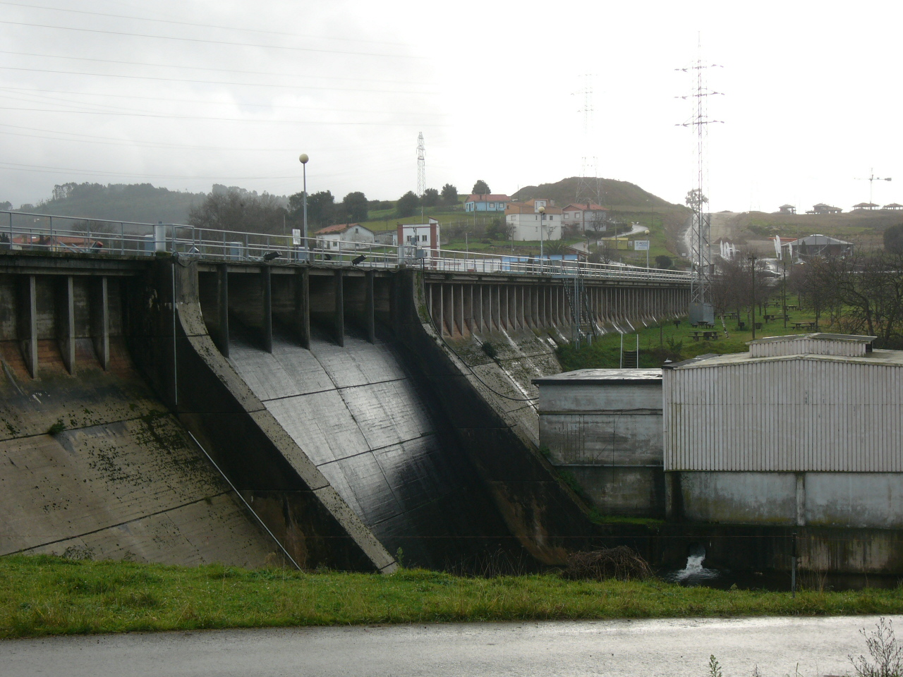 Presa del embalse de Trasona (Asturias - Spain)